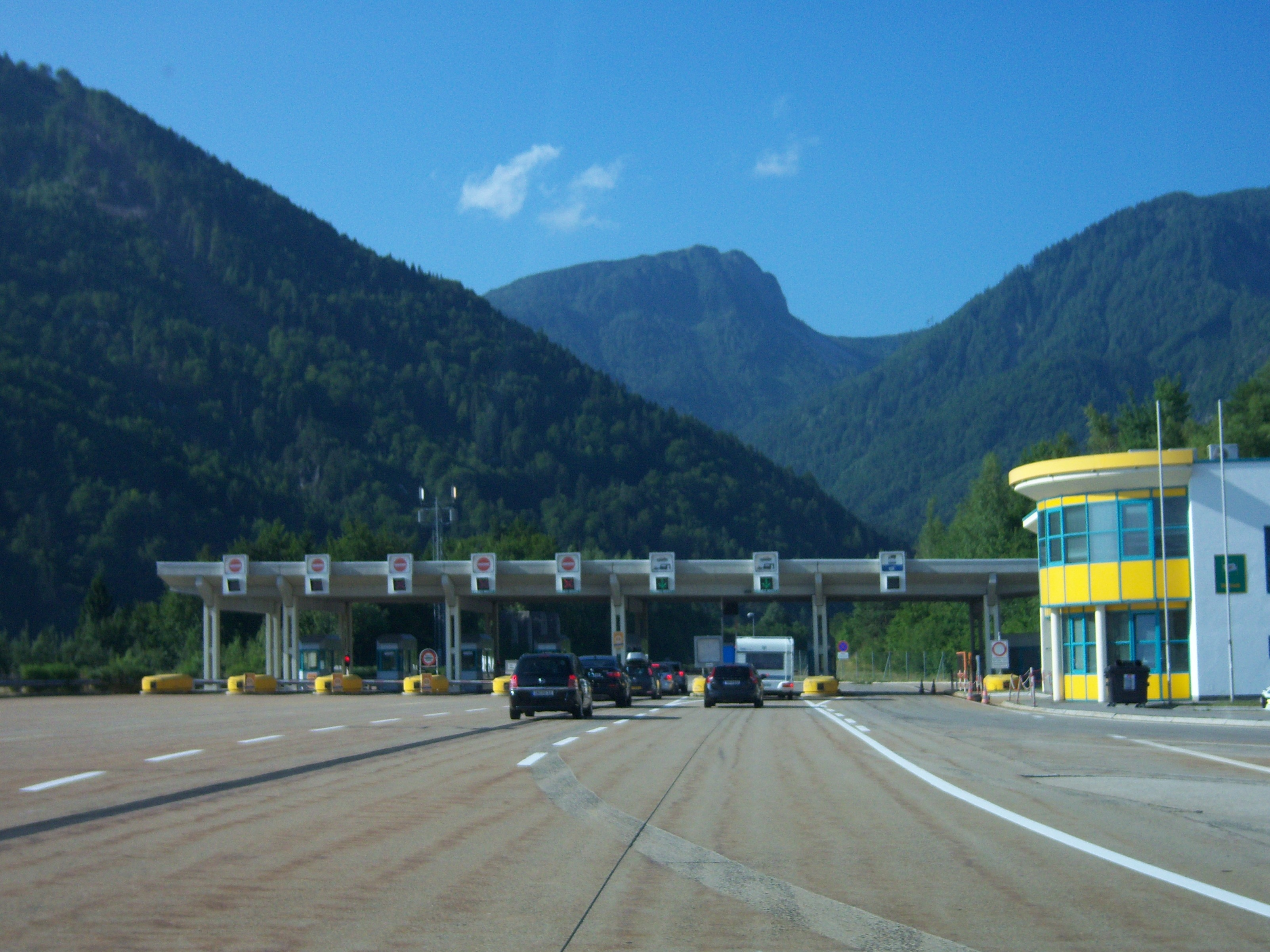 Karawanken Autobahn A11 Richtung Ljubljana vor dem Nordportal des Karawankentunnels